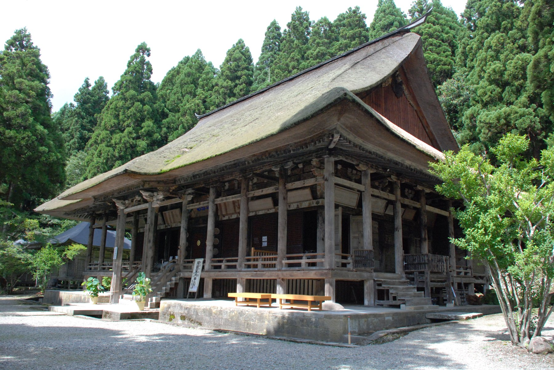 JIONJI(sagae) Tmple Hondou.Main hall in Jionji.